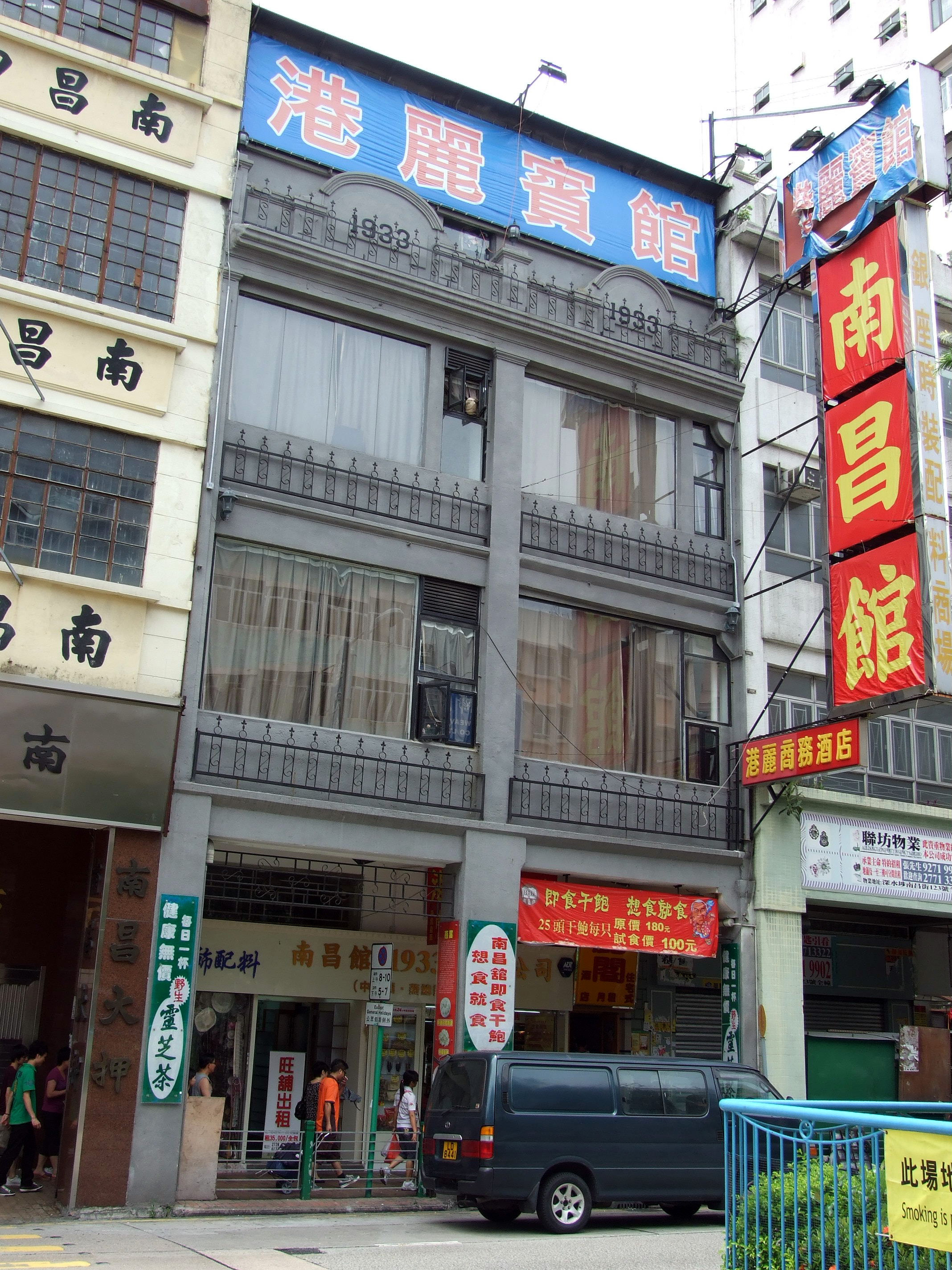 中文（香港）: 南昌街119、121號（海麗賓館）